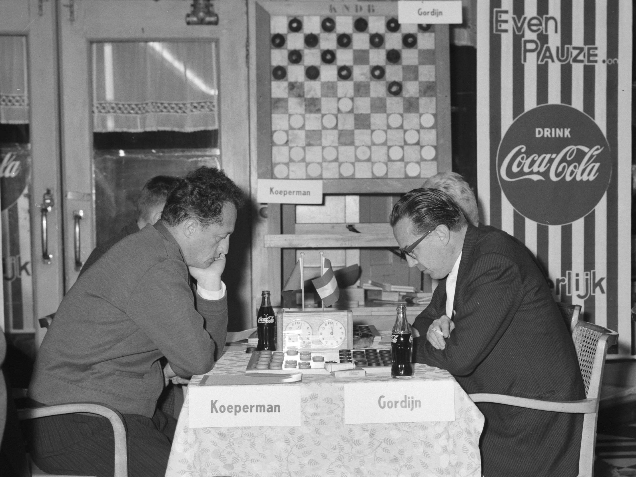 Mensenredder eregast bij de vijfde ronde wereldkampioenschap dammen te Amsterdam, Koeperman tijdens zijn match tegen Gordijn